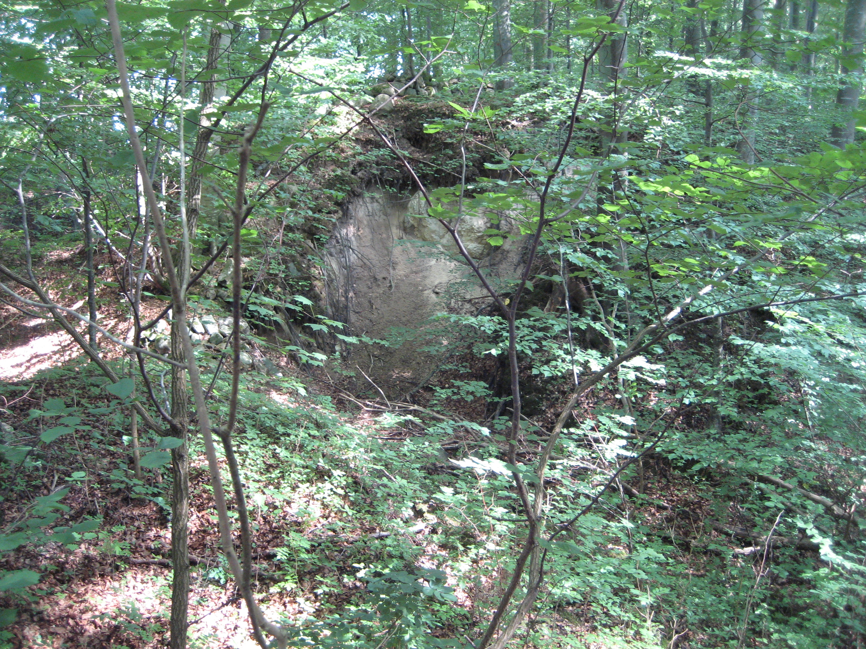 Vedhygge gruvkomplex. Kalkgruva vid Ignaberga som rasat samman.